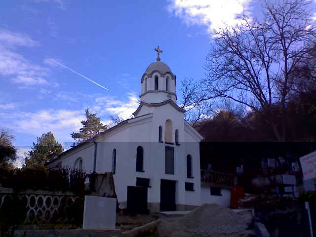 Църквата при гробището